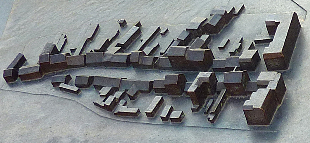 Köpenicker Kietz im Modell. Ausschnitt des Bronzemodells der Köpenicker Altstadt am Luisenhain.